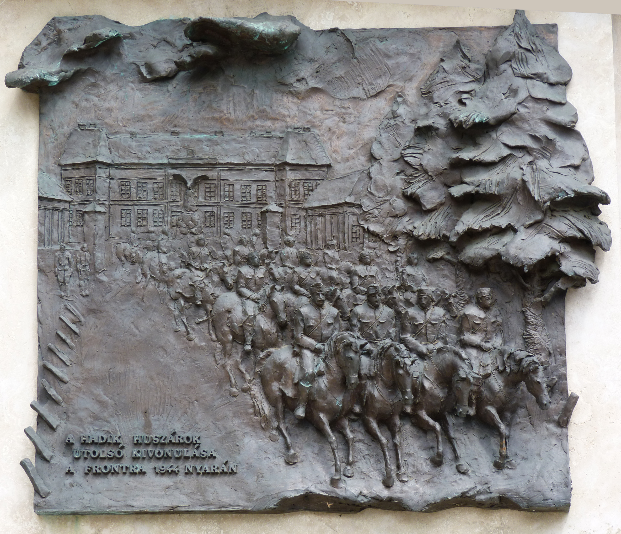 A magyar huszár szobra (Györfi Sándor, 1997) A 300 cm-es talapzat két oldalára 1999-ben egy-egy bronzdomborművet helyeztek el. Az egyik a Hadik-huszárok rohamát idézi fel a napóleoni háborúk korából, míg a másik az utolsó kivonulásukat a frontra 1944 nyarán (a kivonuló katonák hátterében a nyíregyházi laktanya épülete látható).[1] A felvétel 2013. Május 17–én pénteken készült, Nyíregyháza, Országzászló tér.